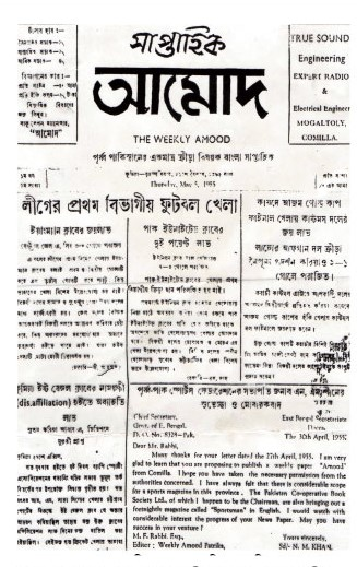 সাপ্তাহিক আমোদের প্রথম সংখ্যা ১৯৫৫ সালের ৫ মে